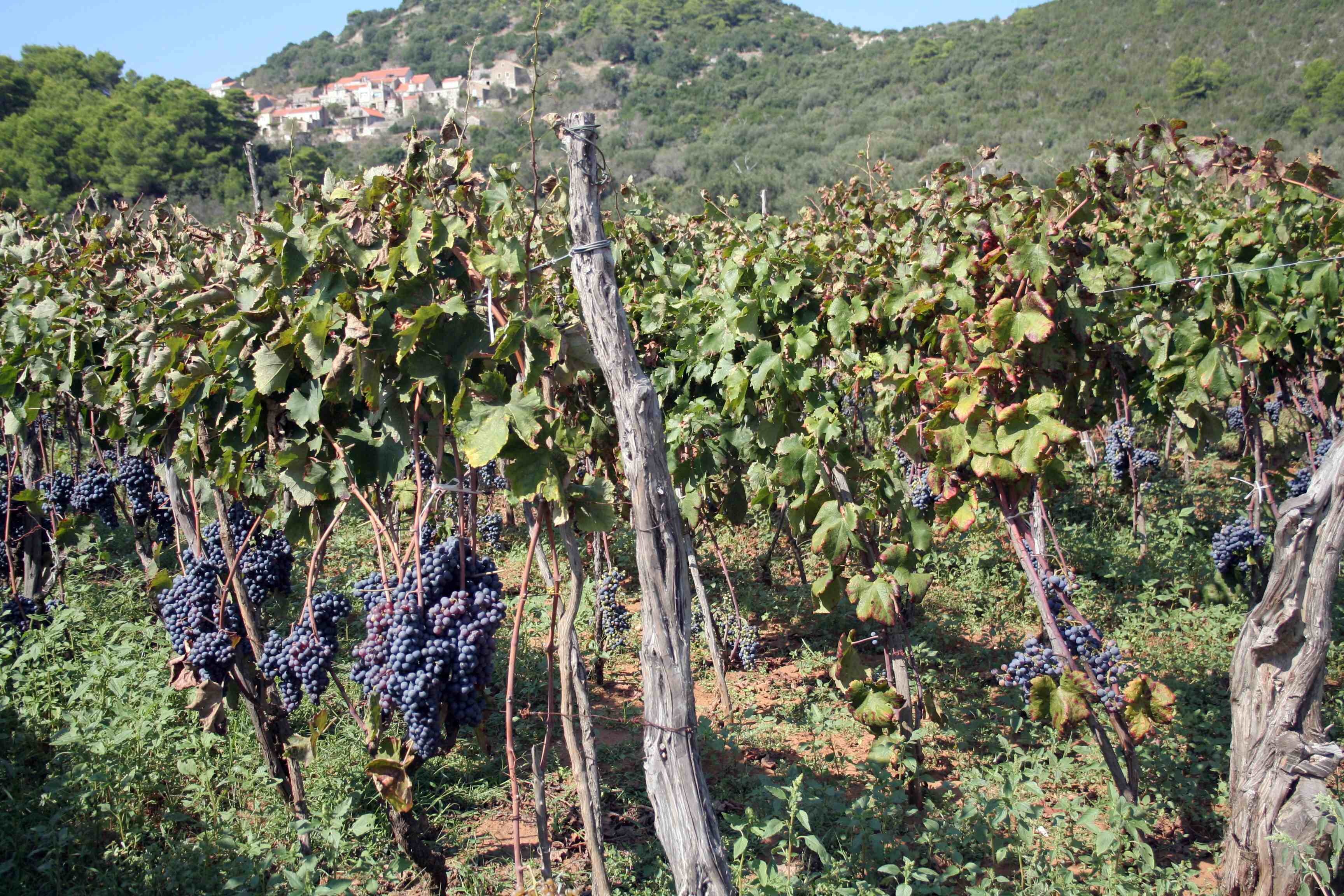 Lastovo, Weinberg